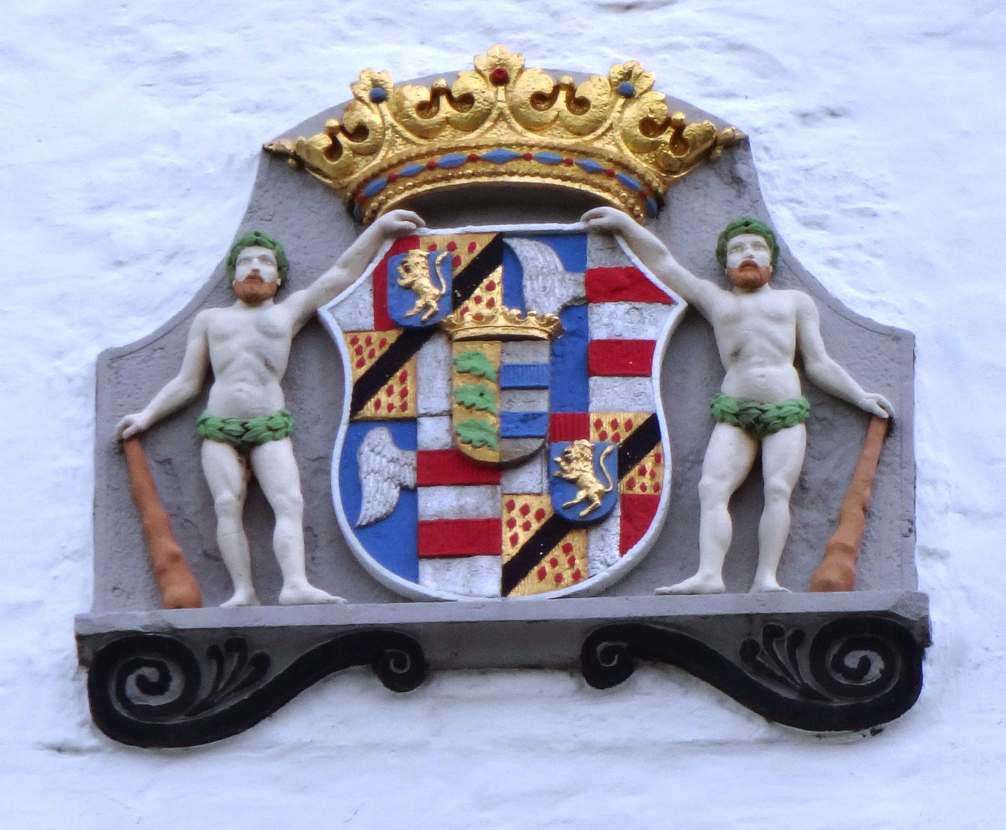 Wappen über Eingang Schloss Ahrensburg